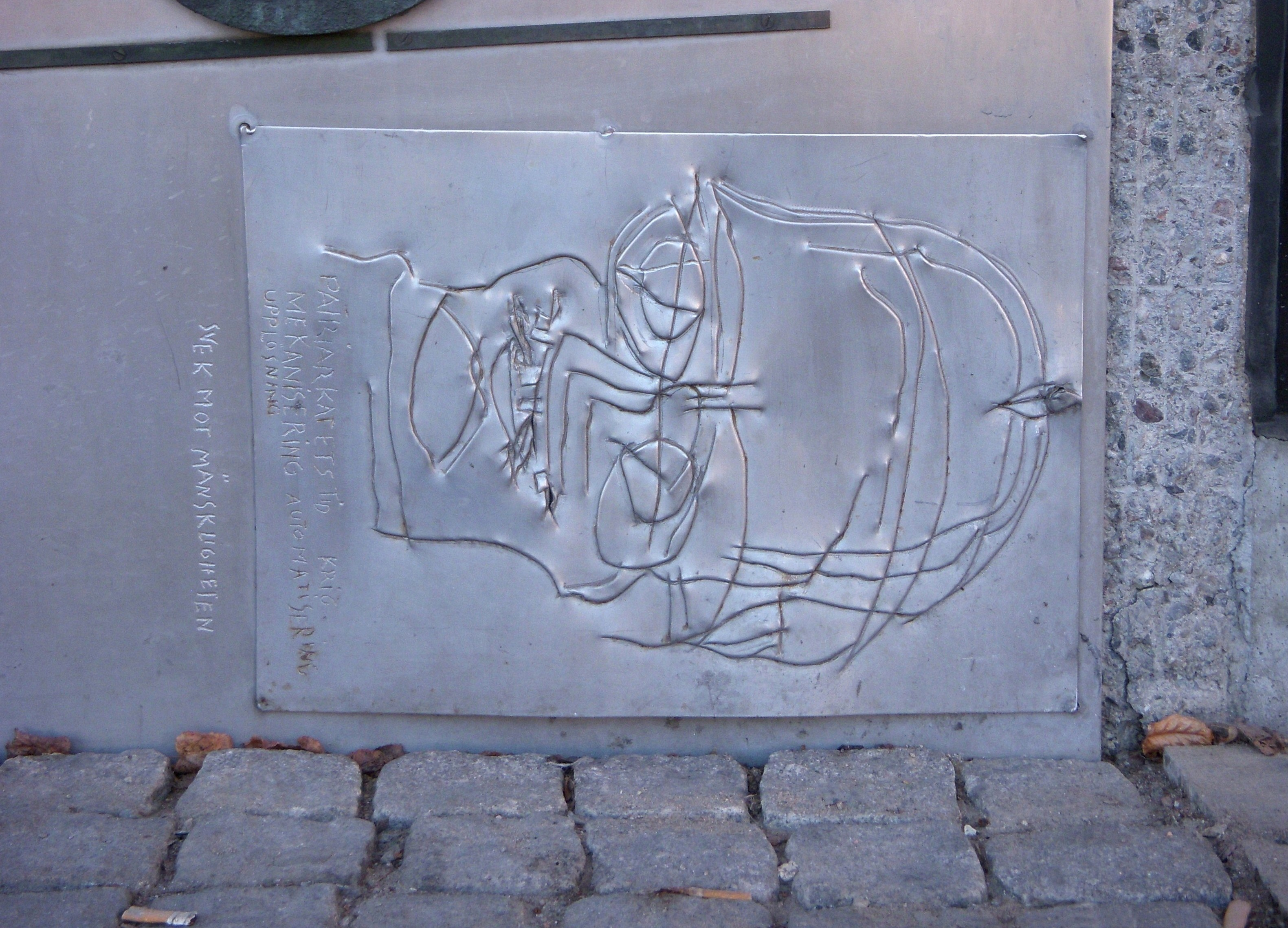 Siri Derkerts "Sverigeväggen" på Sverigehusets fasad i Stockholm, detalj